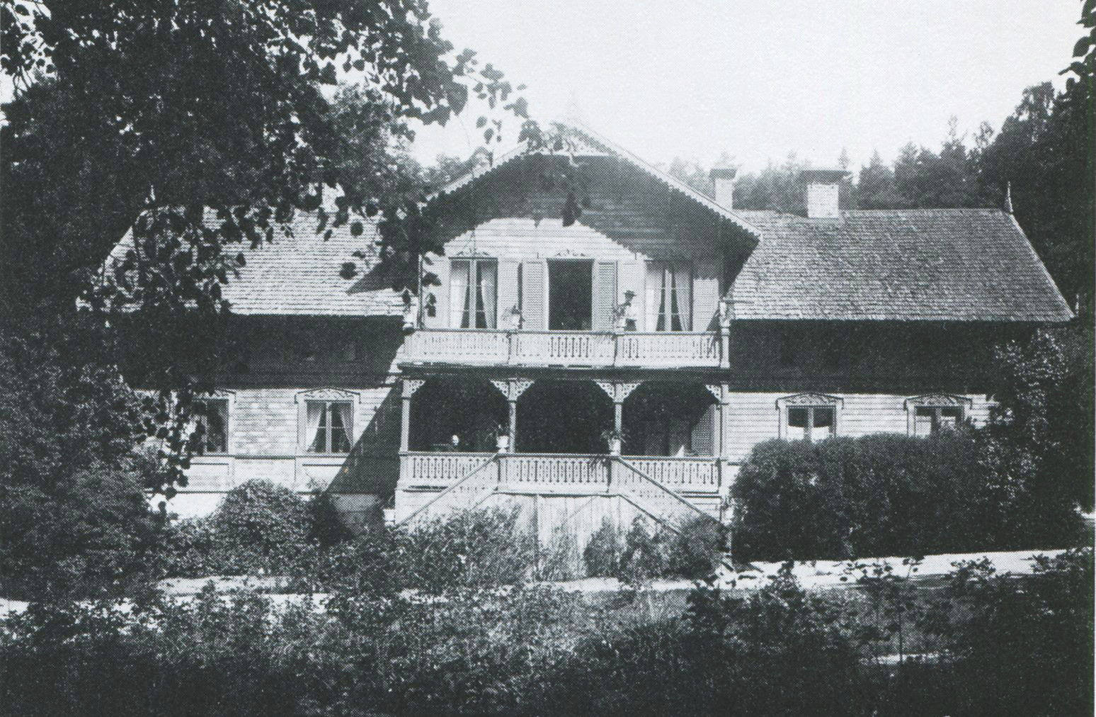 Brunnshuset Vårby källa 1909, med den naturskyddade asken till vänster (uppges vara Sveriges näst största)